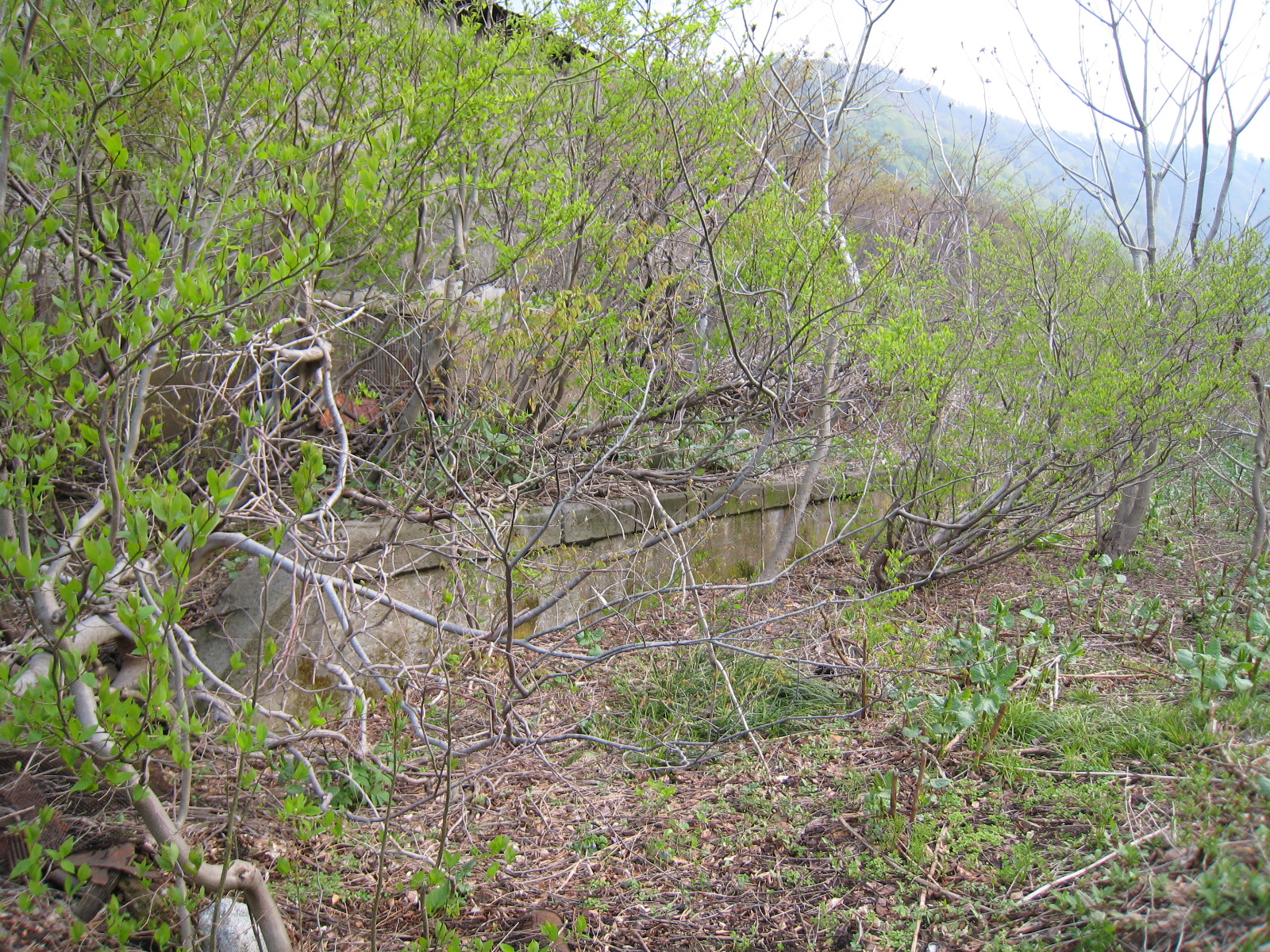 米坂線、旧玉川口駅上りホーム跡